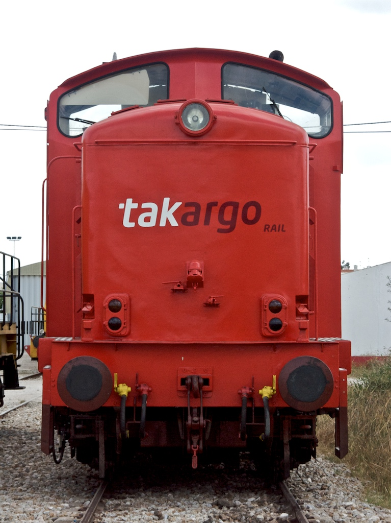 Local: Poceirão [Linha do Alentejo, PK 30] Data e hora: 31 de Agosto de 2008 [11h10] Material: Locomotiva 1449 [English Electric • Sorefame] N.º UIC: 90 94 110 1449-3 (Takargo Rail)